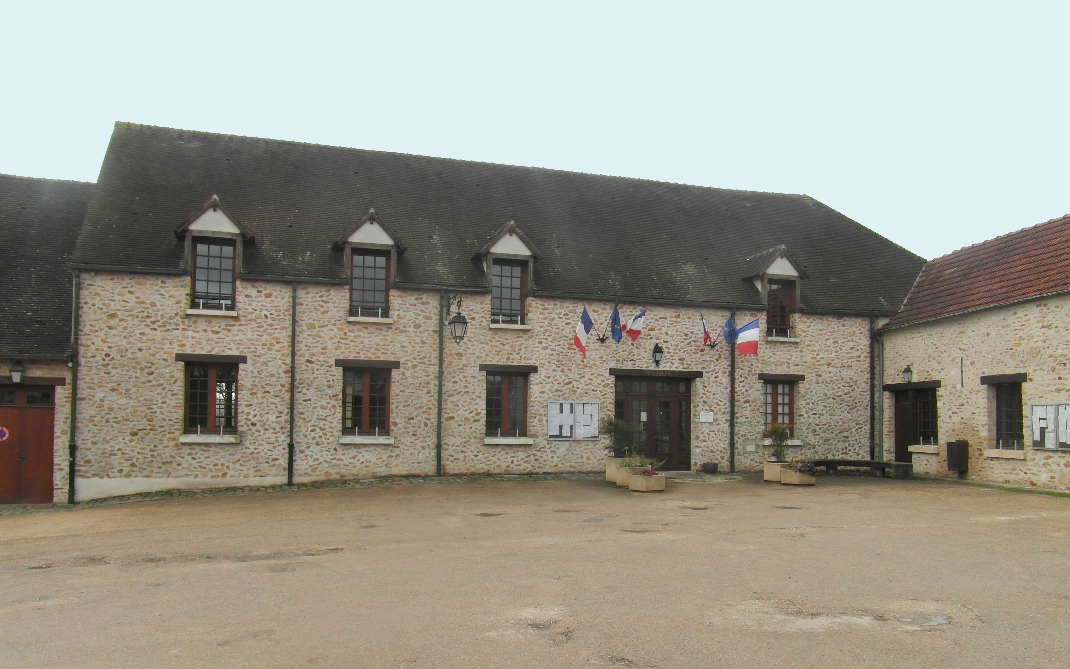 Mairie de Marolles-en-Brie (Val-de-Marne)